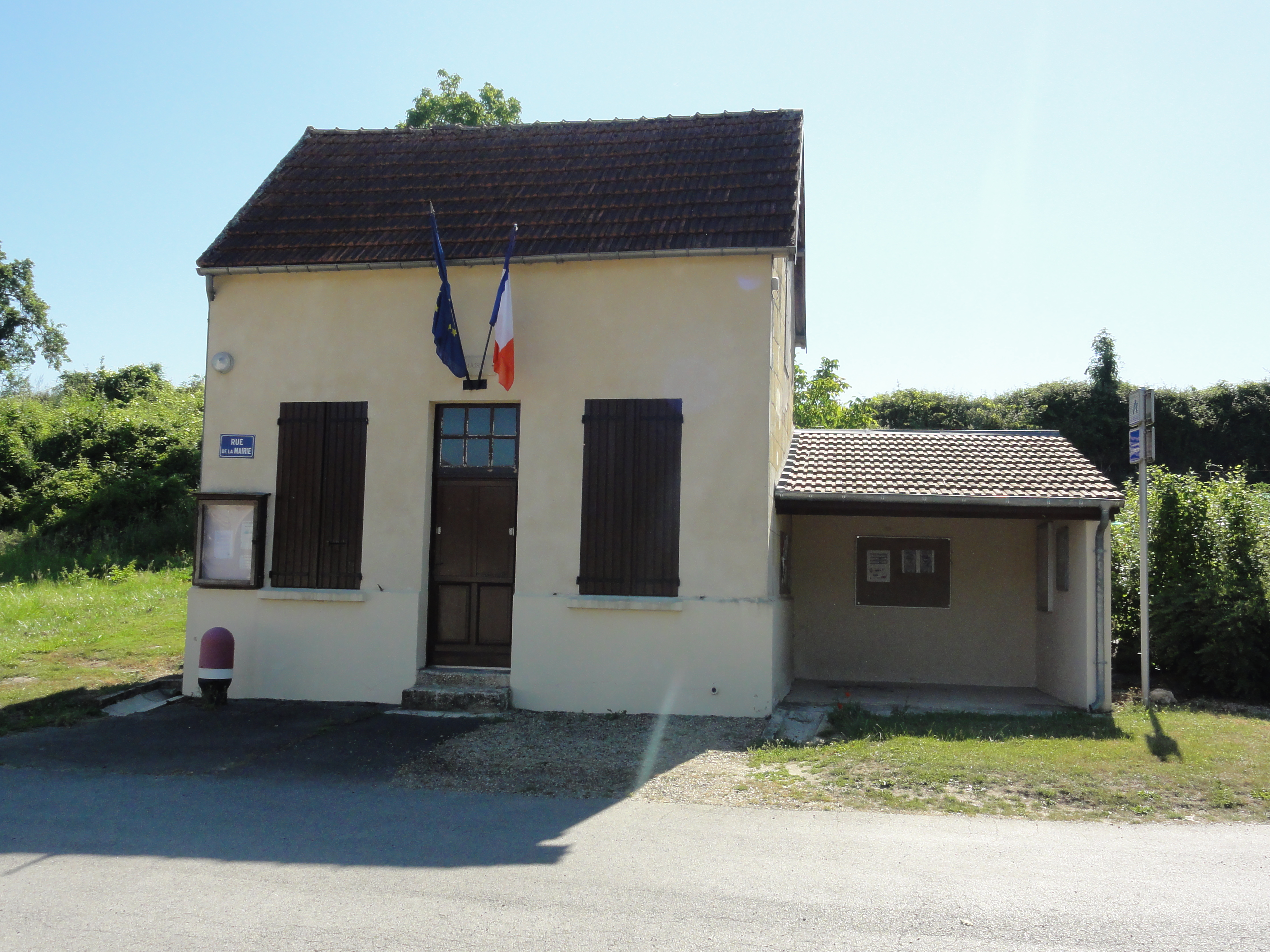 Muscourt (Aisne) mairie